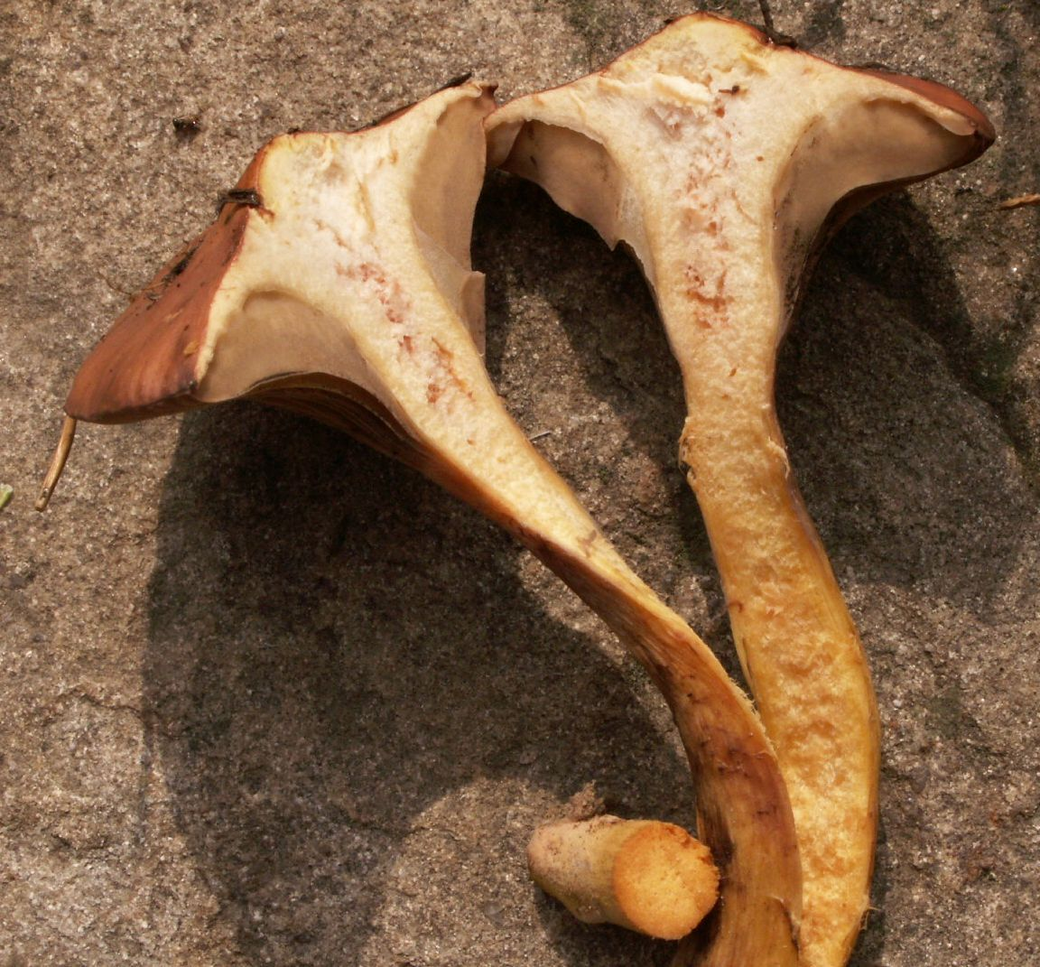 Chroogomphus rutilus, Birken- und Kieferhain, Litauen